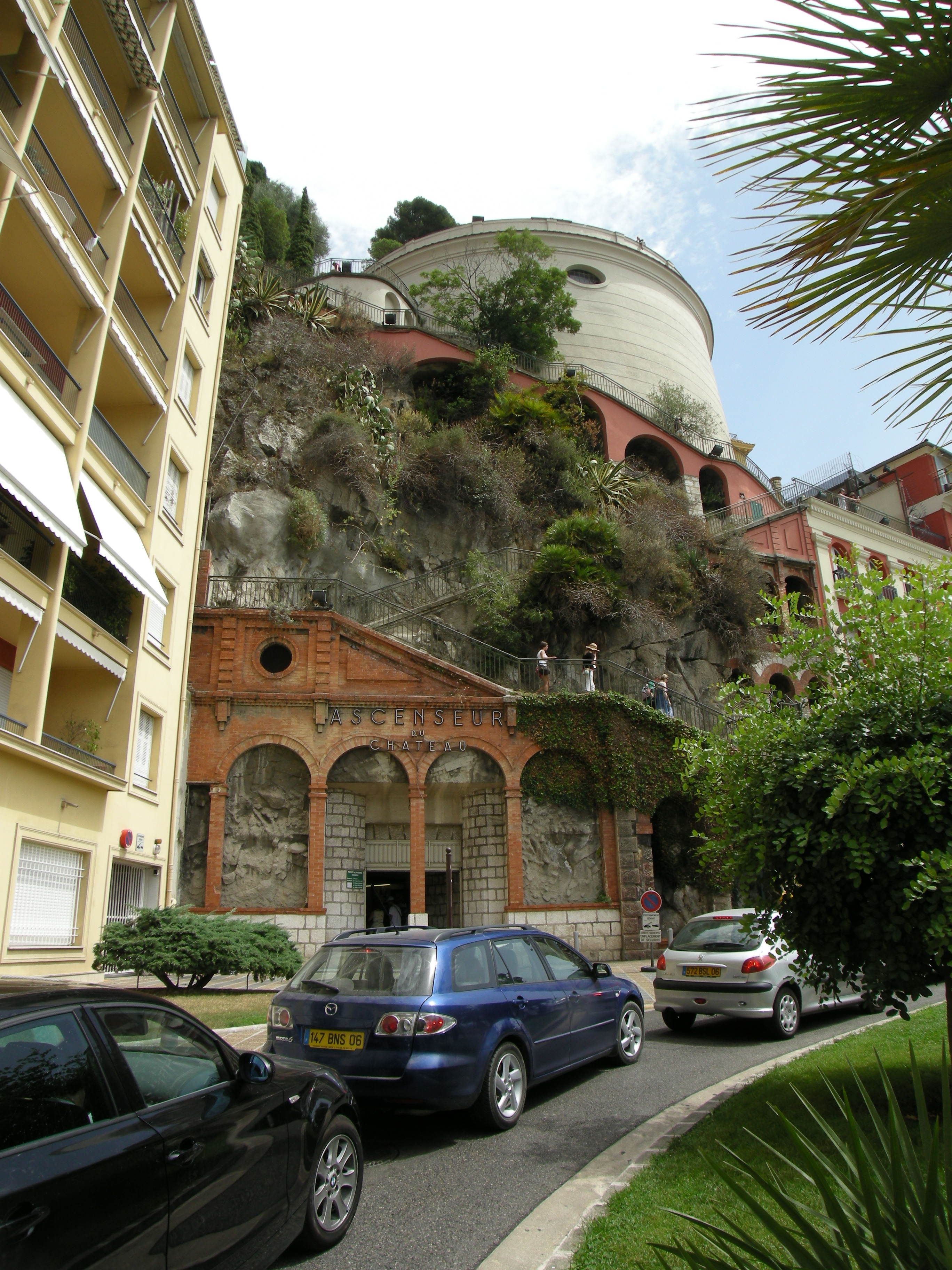 Ascenseur du Château, Nice, France